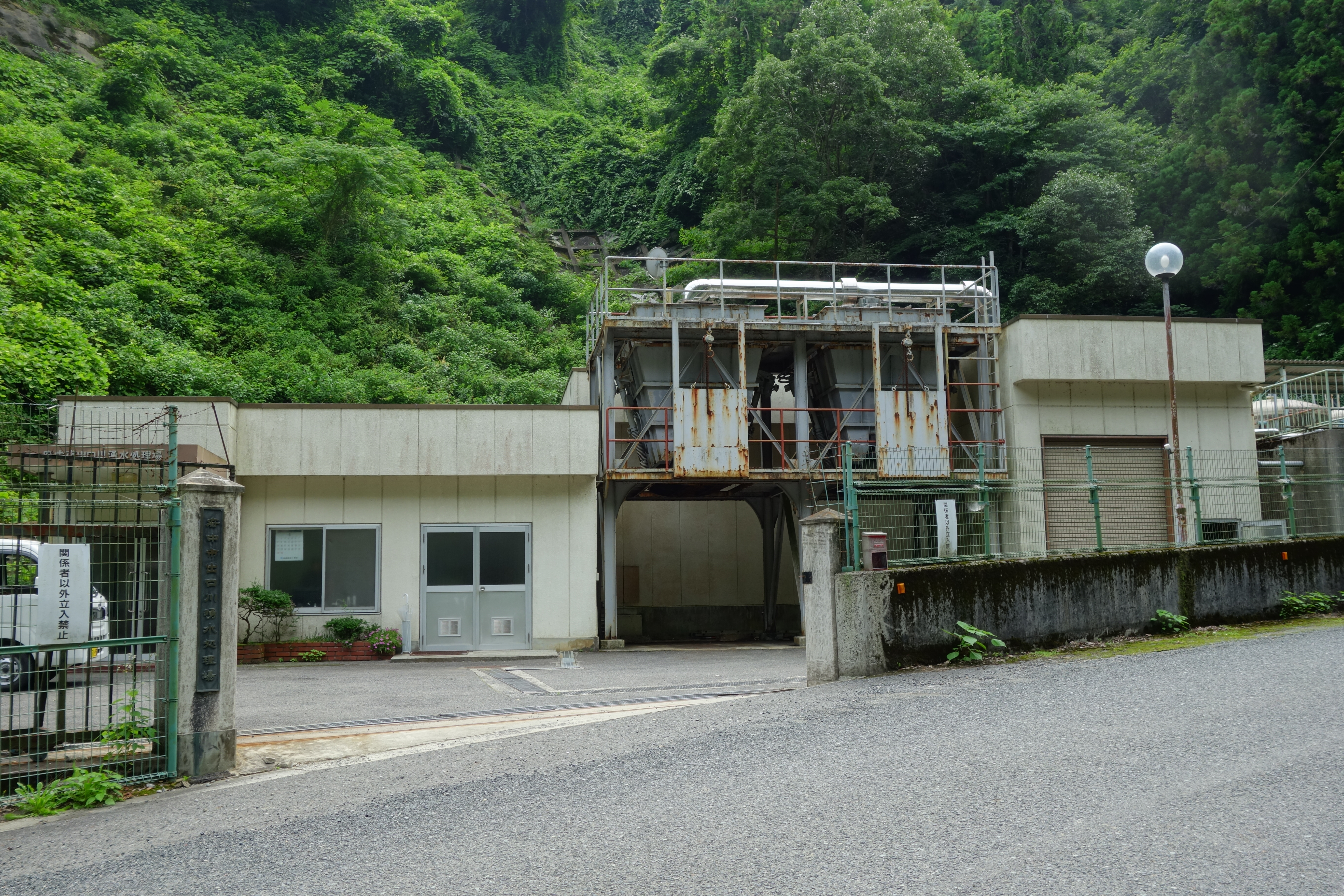 広島県府中市の出口川湧水処理場